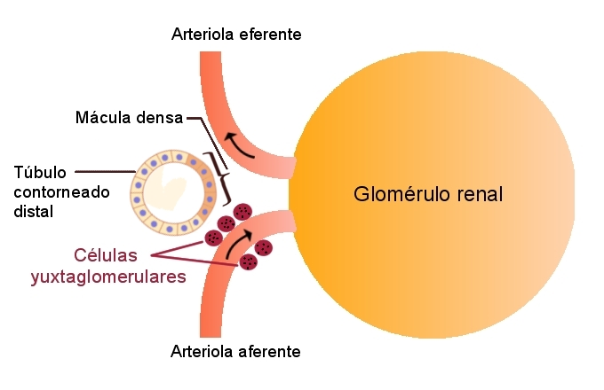 Esquema en el que se muestra la ubicación de las células yuxtaglomerulares en el riñón.